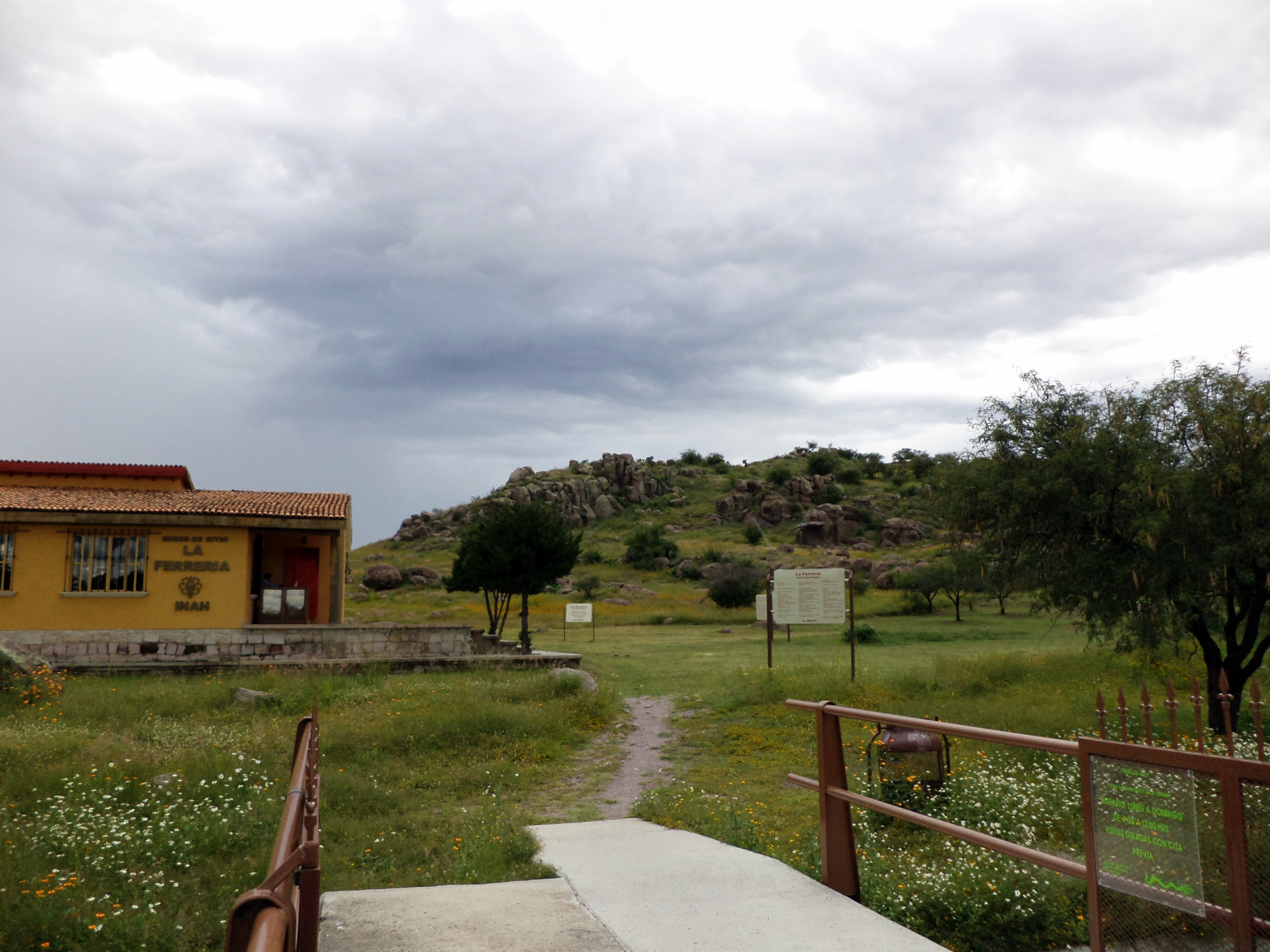 Vista desde la entrada a la Zona Arqueológica "La Ferrería"